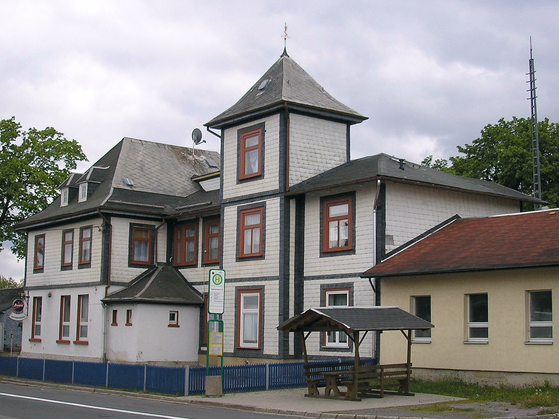 Bahnhof von Großbreitenbach (Thüringen).